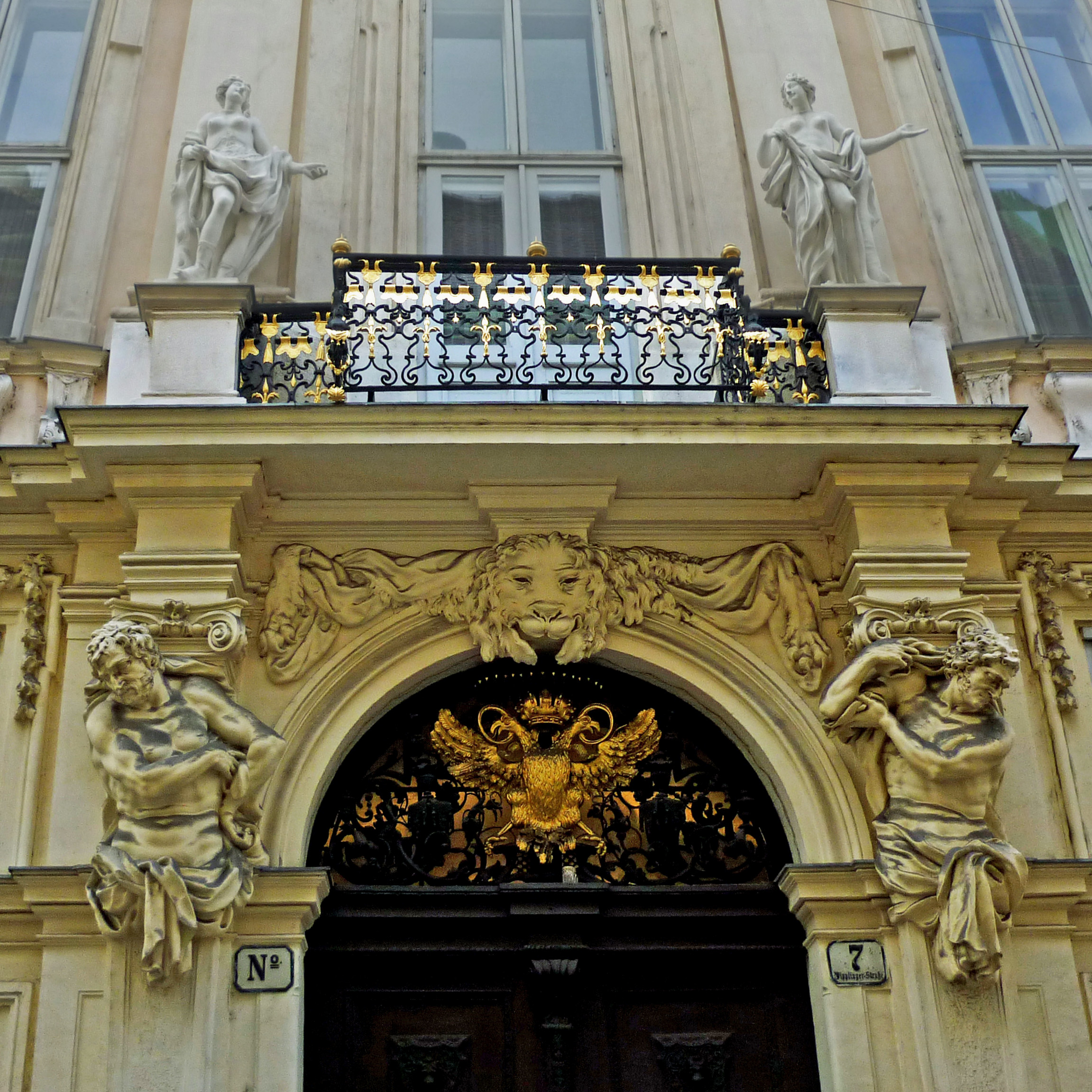 Ehem. Böhmische Hofkanzlei Wien, jetzt Verwaltungsgerichtshof, Wipplingerstraße